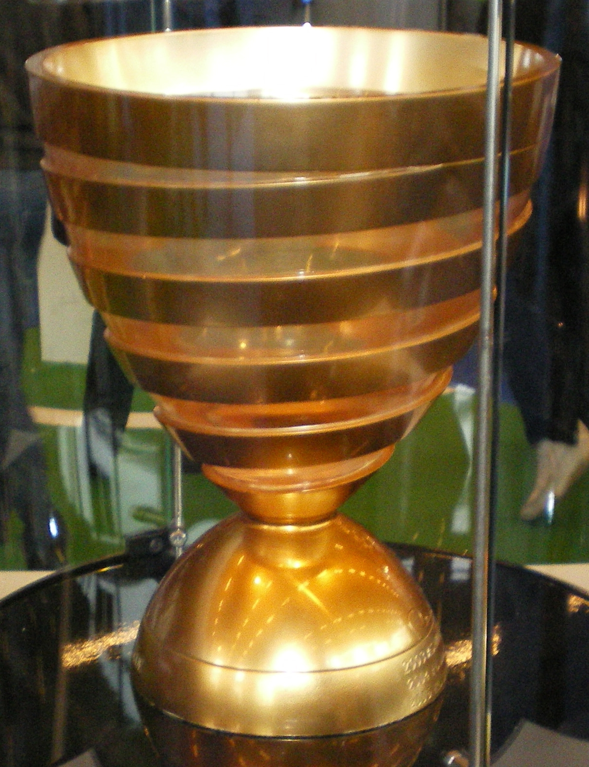 Le second trophée de la Coupe de la Ligue.